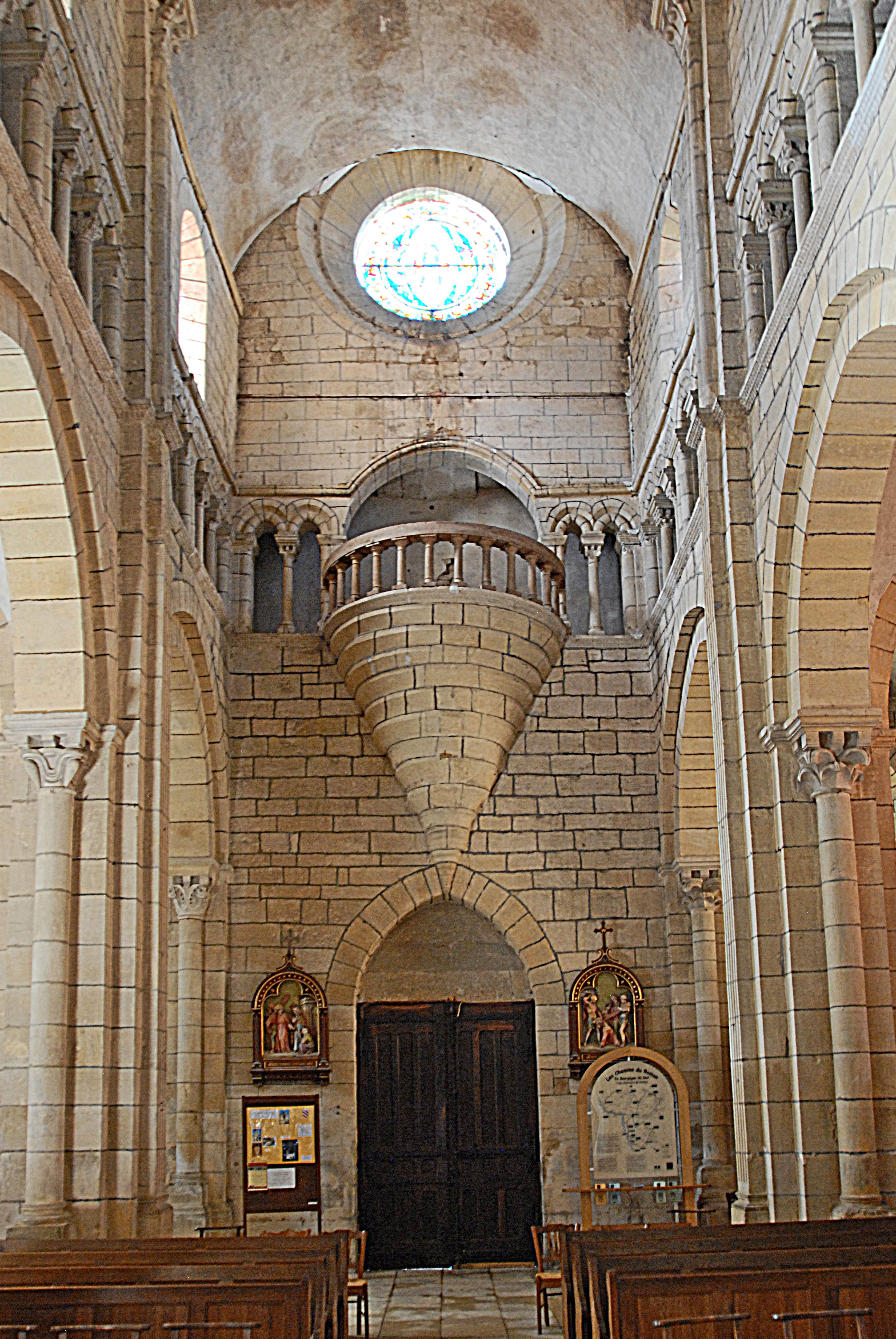 St-Hilaire de Semur-en-Brionnais, Mittelschiff zur Westwand